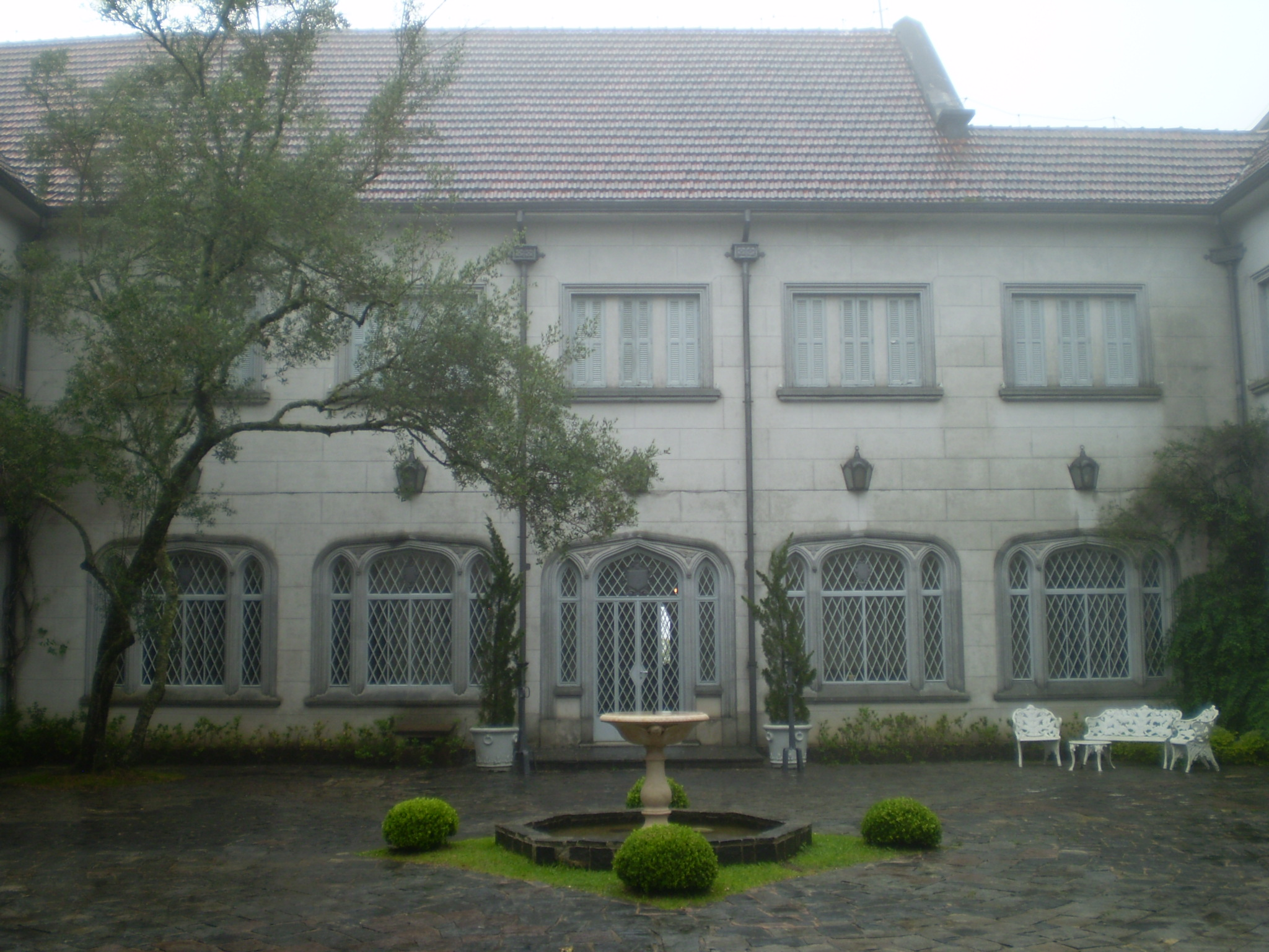 Palacio de Inverno do Governador de São Paulo em Campos do Jordão - Pátio Interno